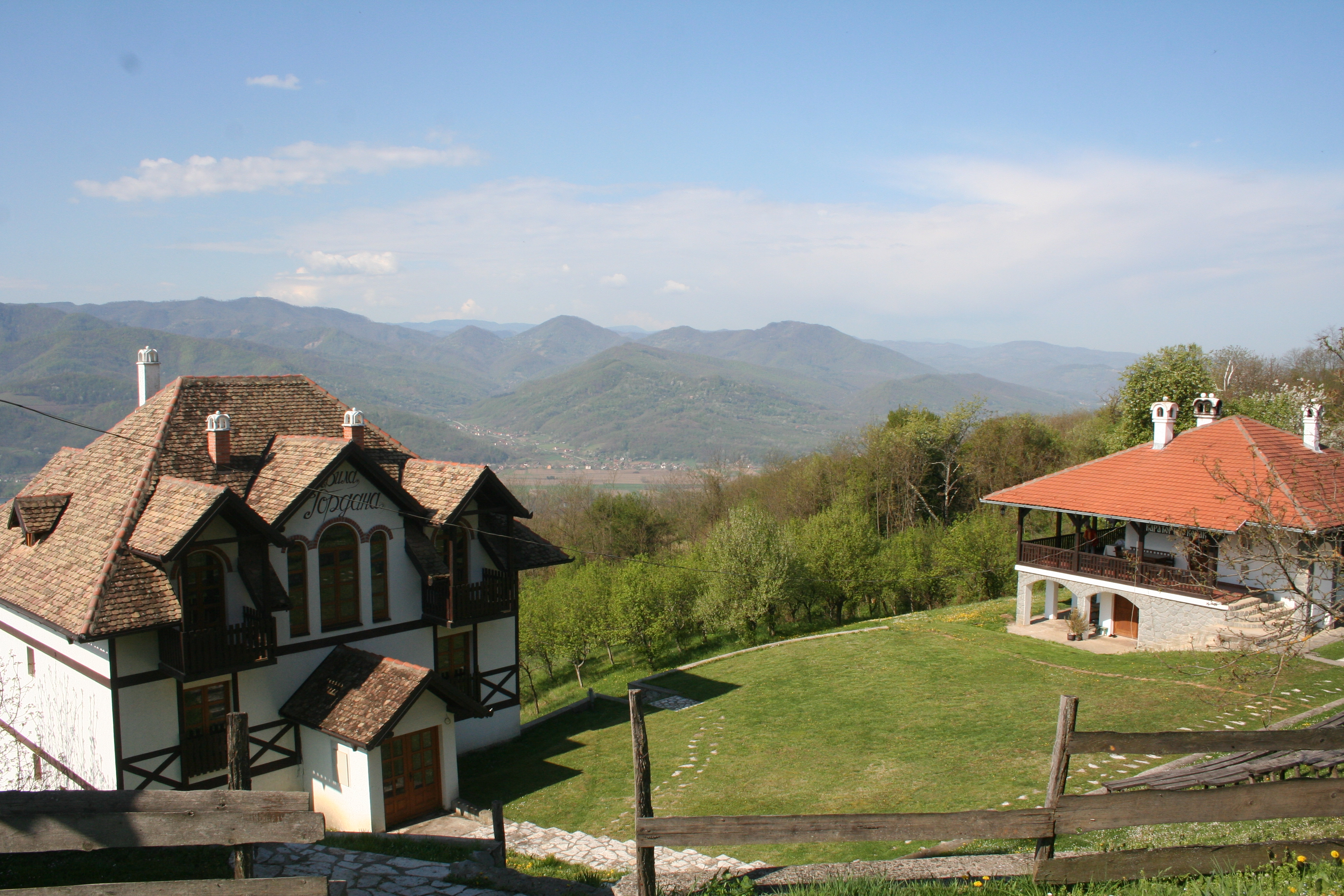 Etno kompleks Ognjište, Bjele vode